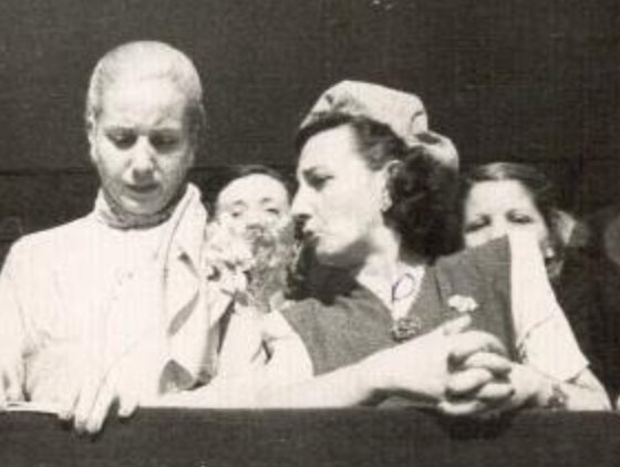 Eva Perón y Ana Carmen Macri durante un acto del Partido Peronista Femenino en 1951.